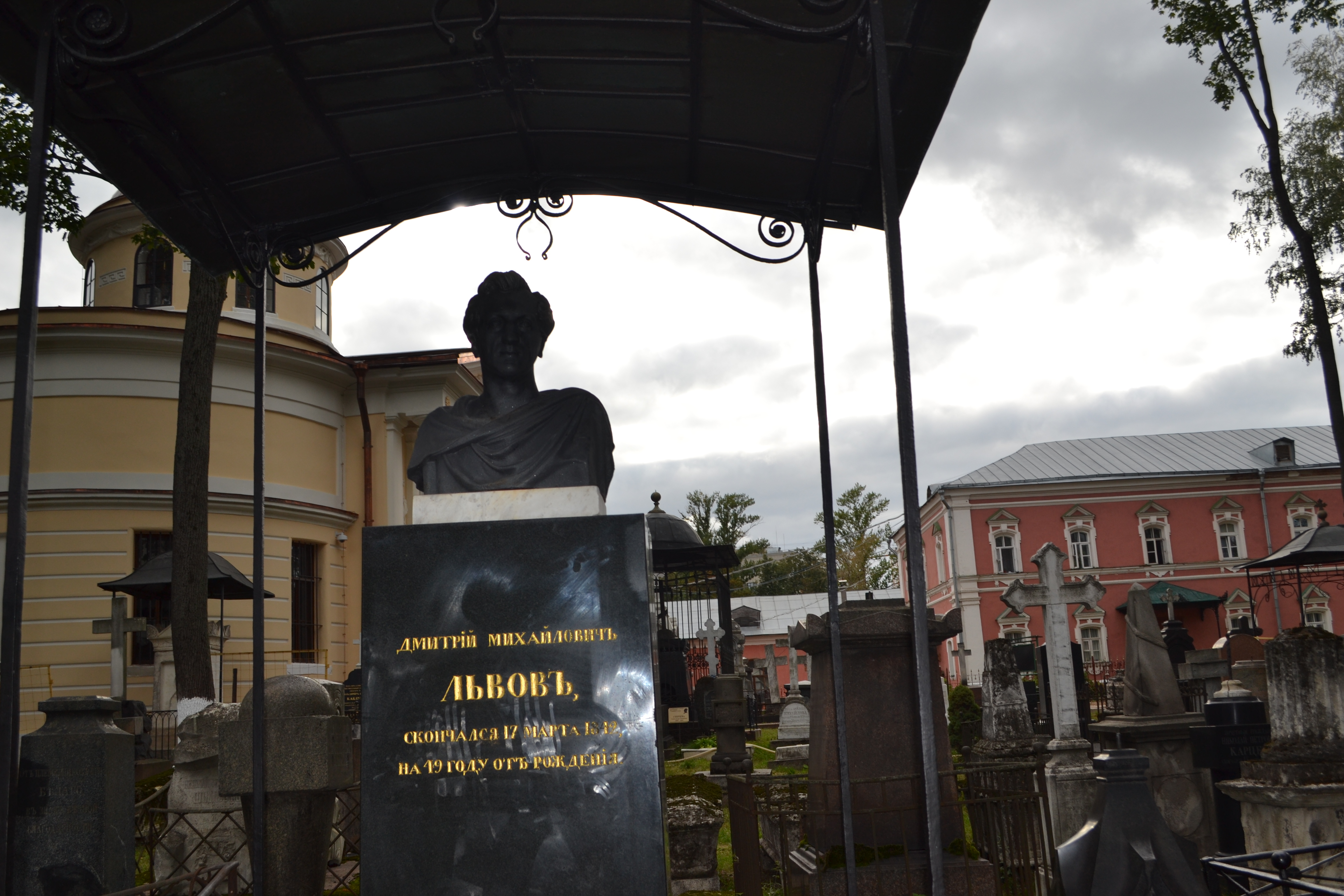 Могила в некрополе Донского монастыря . Пример неумелого использования фотоаппаратуры.